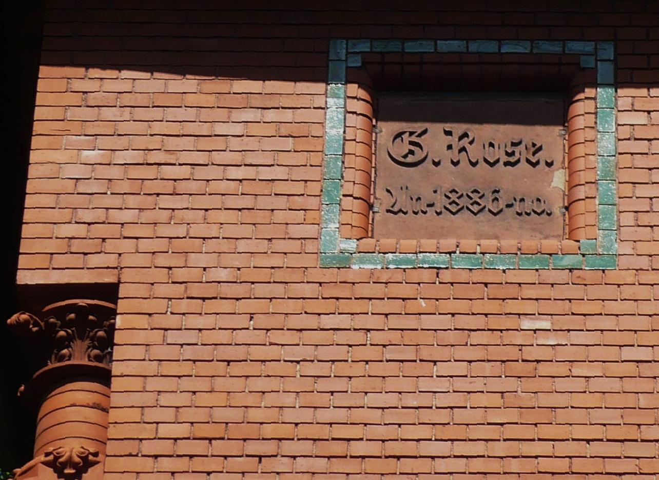 Nowa Ruda, ul. Mikołaja Kopernika 8 - Willa Rose, 1886